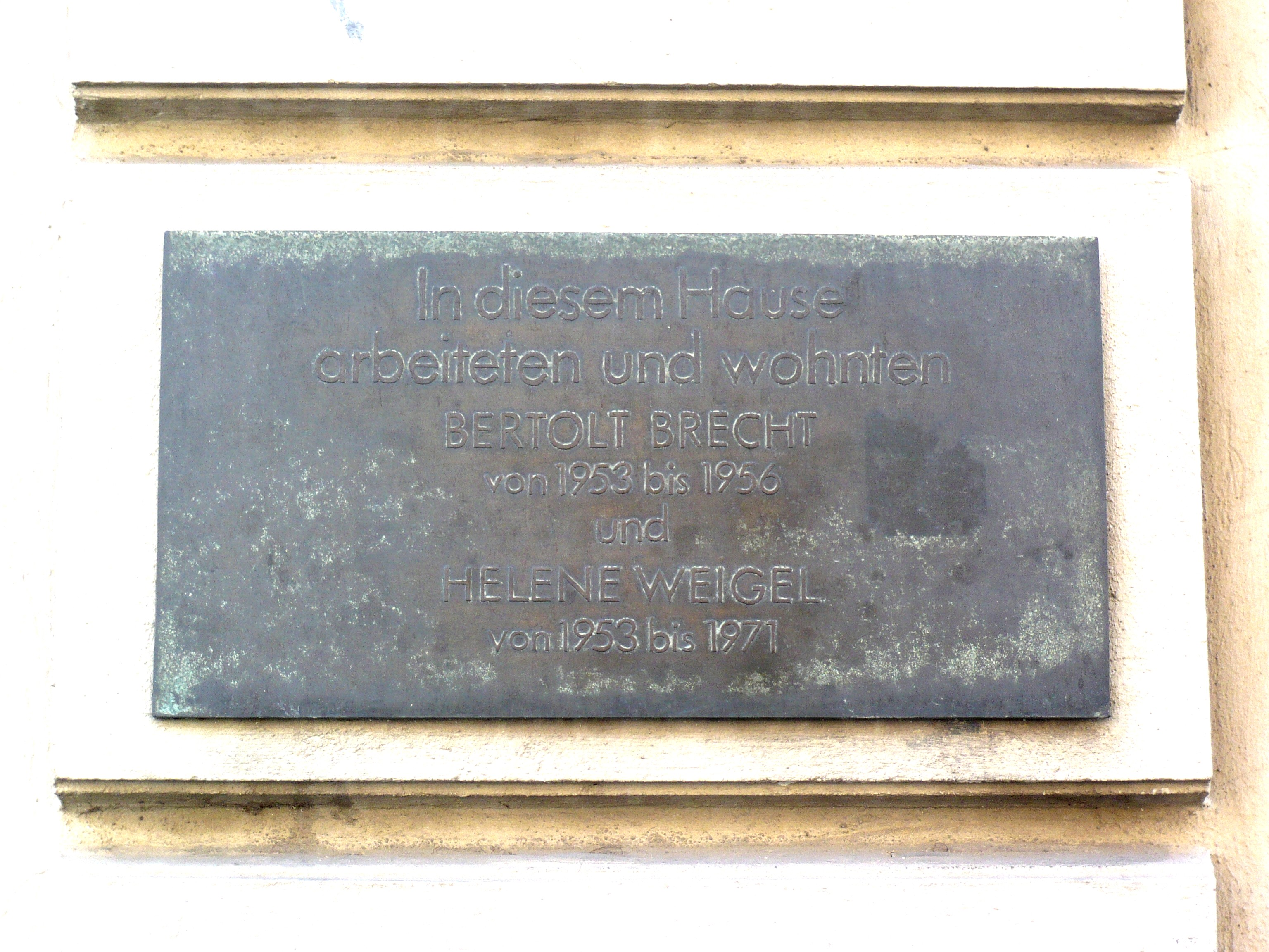 Chausseestrasse 125 in Berlin-Mitte, Gedenktafel Brecht + Weigel)